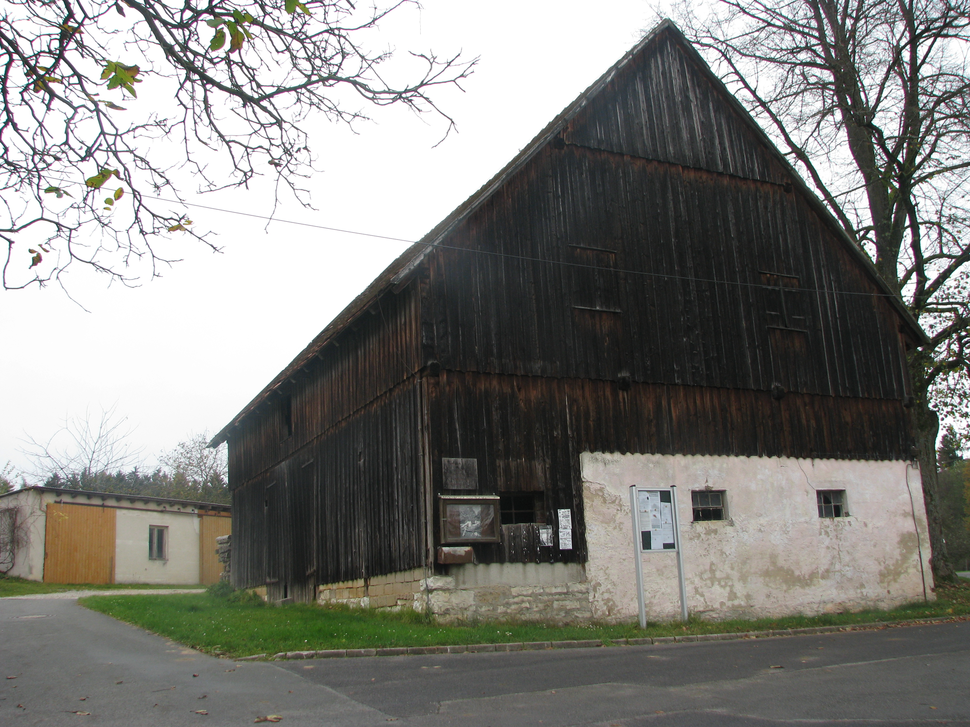 Rührersberg, Ortsteil der Gemeinde Berg bei Neumarkt in der Oberpfalz, Stadel